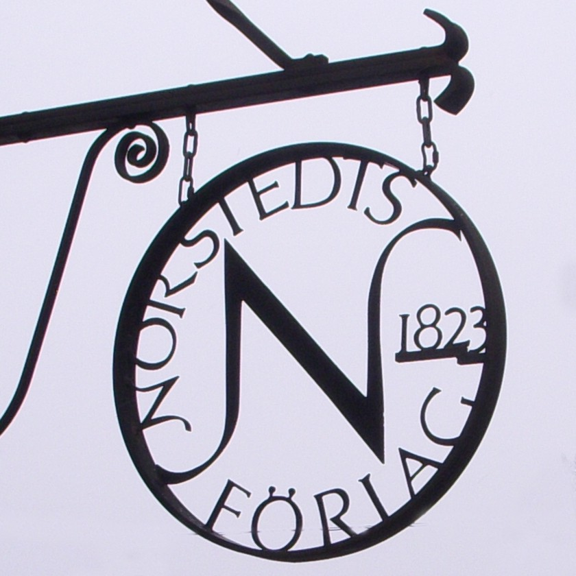 Norstedts Förlags smidesskylt på förlagsbyggnaden i Stockholm, Riddarholmen